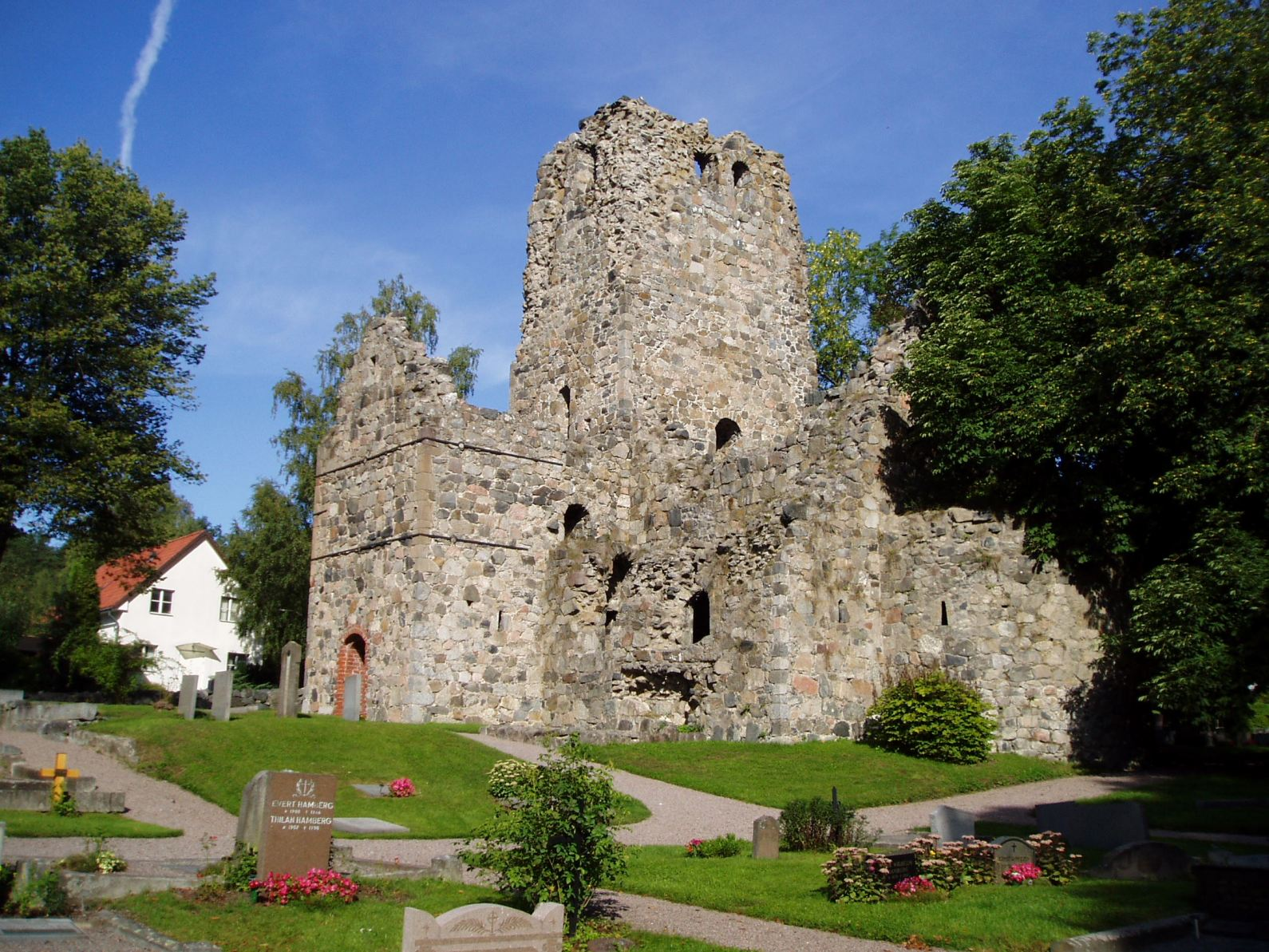 ruin Olofskyrka, Sigtuna.